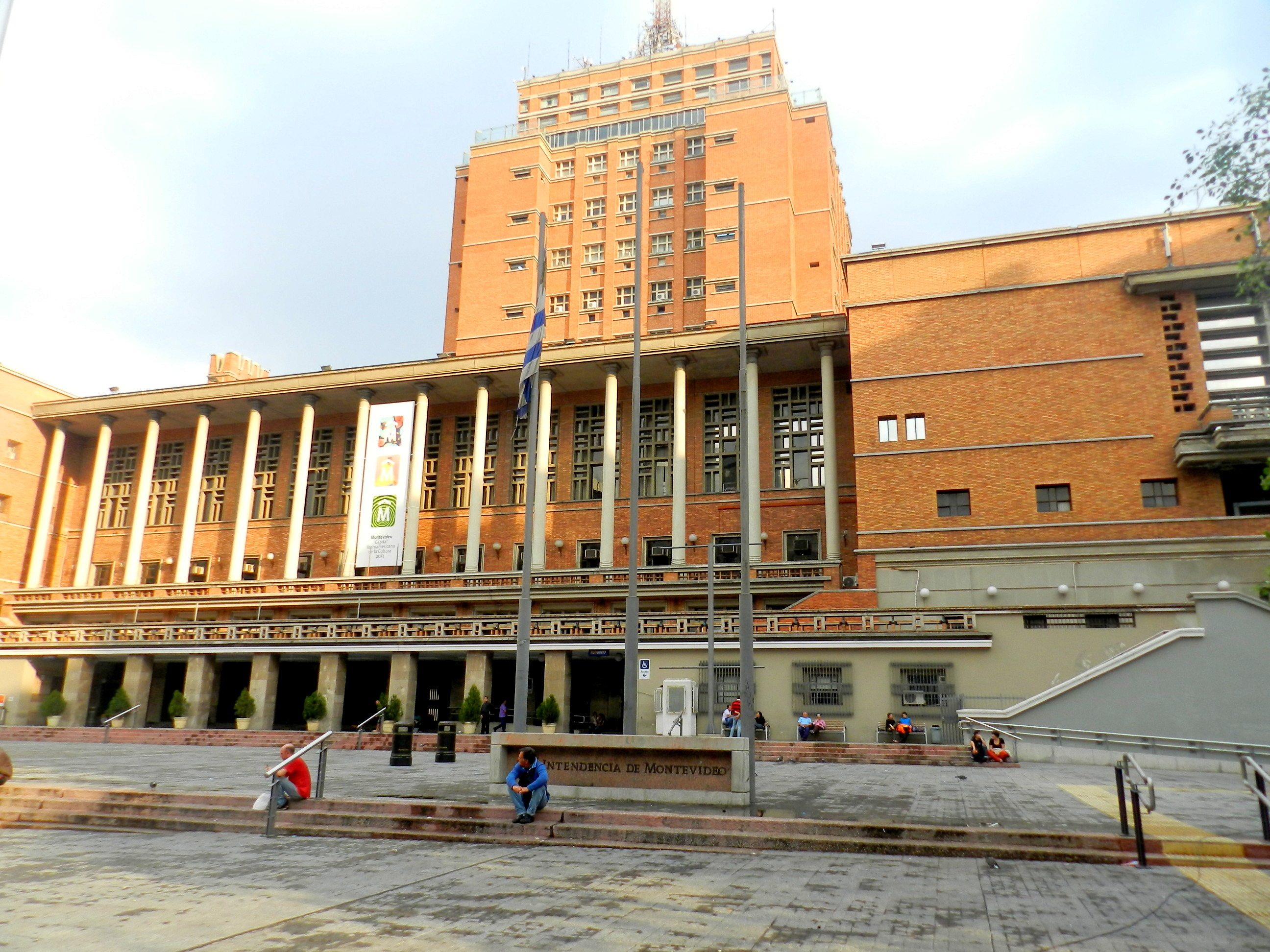 DSCN3150 / Frente sobre la calle 18 de Julio de la Palacio Municipal de Montevideo (año 2013).